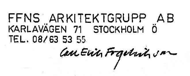 Carl Erik Fogelviks signatur